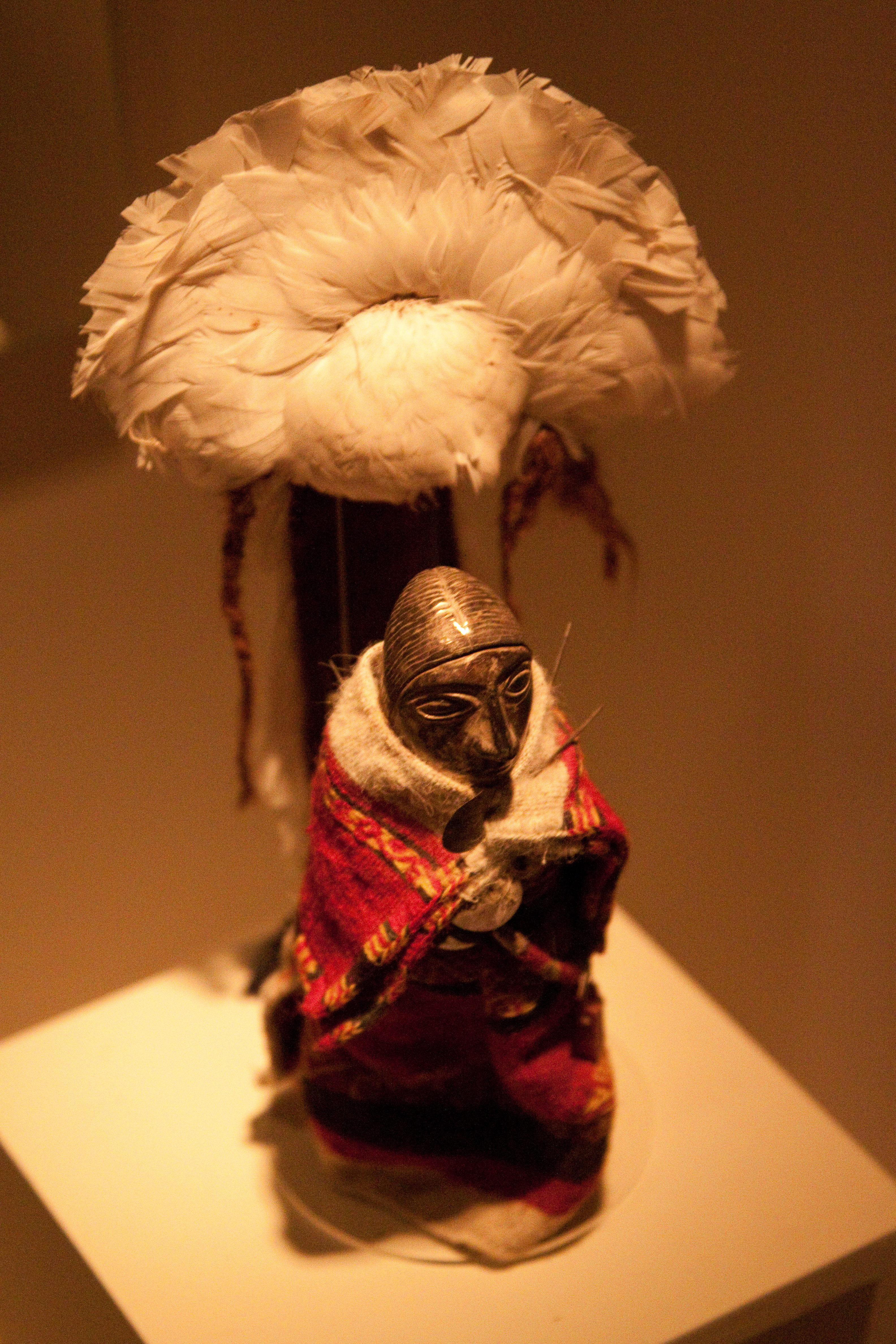 Ajuar momias del Llullaillaco. Salta. Argentina